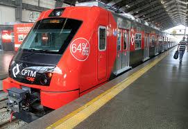 O governador Geraldo Alckmin entregou nesta segunda-feira, 6/02, os quatro primeiros novos trens para a Linha 8-Diamante (Julio Prestes-Itapevi), da CPTM (Companhia Paulista de Trens Metropolitanos). Os quatro trens já passaram pela fase de testes e a partir de agora entram no período de operação assistida, com técnicos monitorando as viagens com passageiros, fora dos horários de pico.